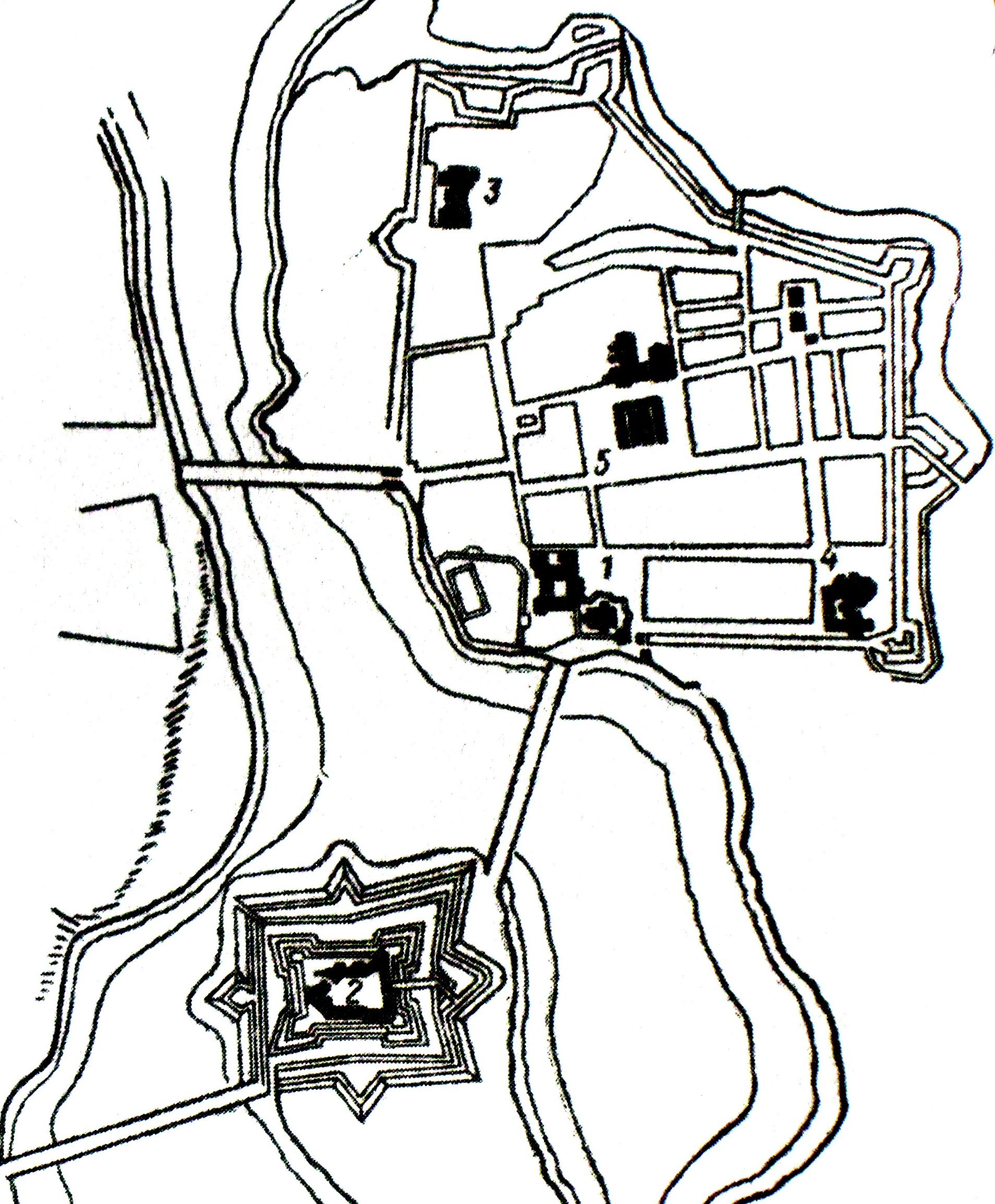 План Нясвіжскага замку і горада ў 1665